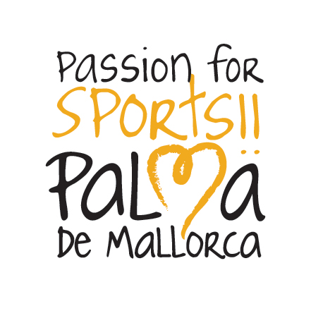 Logo Turístico del deporte en Palma de Mallorca